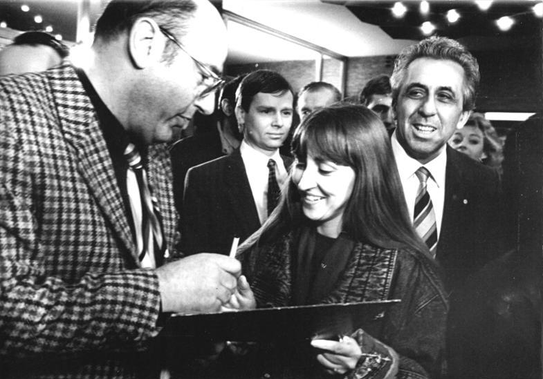 ADN-ZB-Settnik-23.11.89-wü-Berlin: Wiederaufführung-Manfred Krug (l), Hauptdarsteller, und Staatsratsvorsitzender Egon Krenz im Kino "International" kurz vor der Wiederaufführung des 1966 drei Tage nach der Premiere verbotenen Films "Spur der Steine". Mit fast erschreckender Aktualität bietet der Film von Frank Beyer nach dem Roman von Erik Neutsch einen überraschenden Blick auf die Geschichte der DDR."